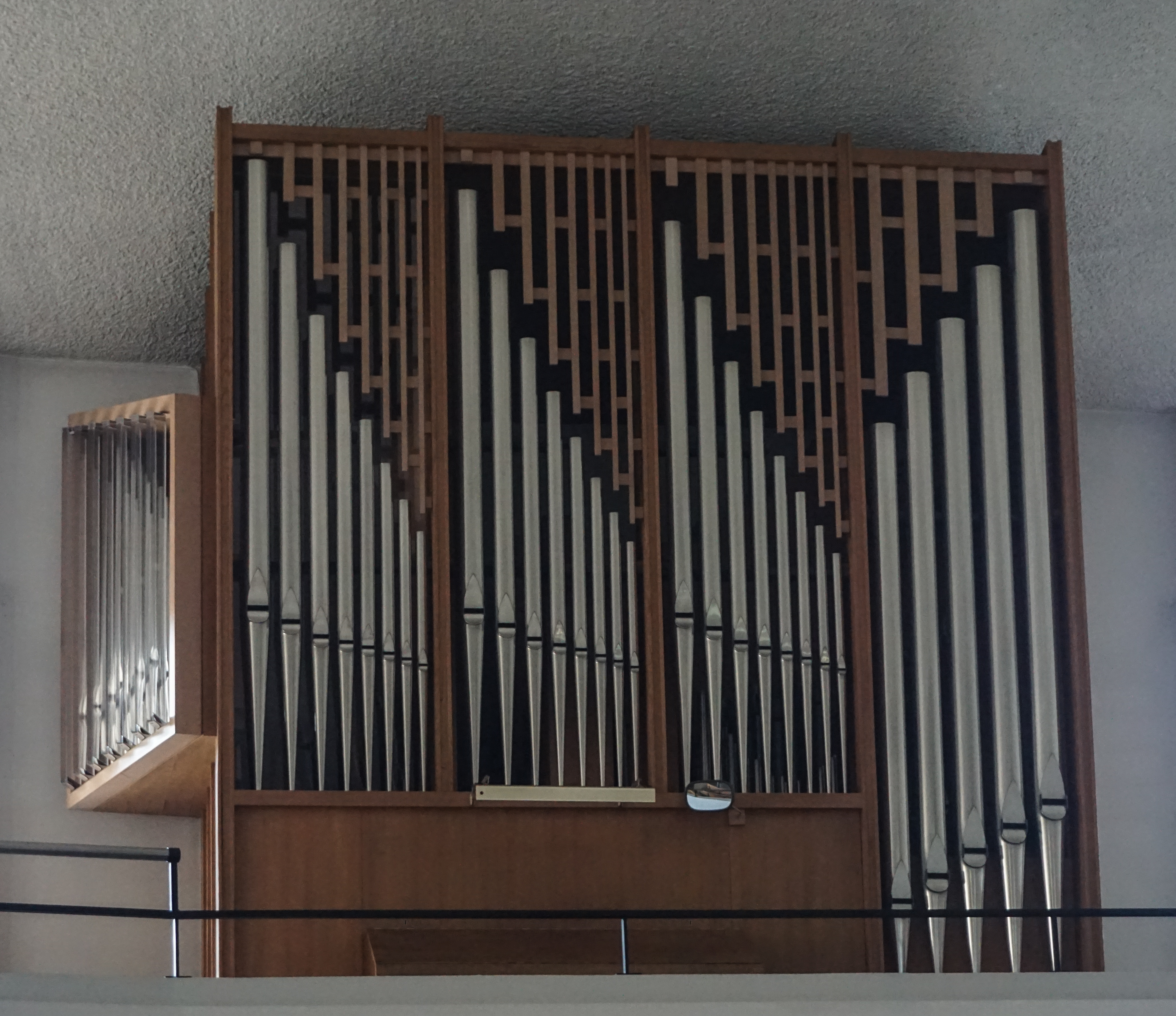 Orgelprospekt